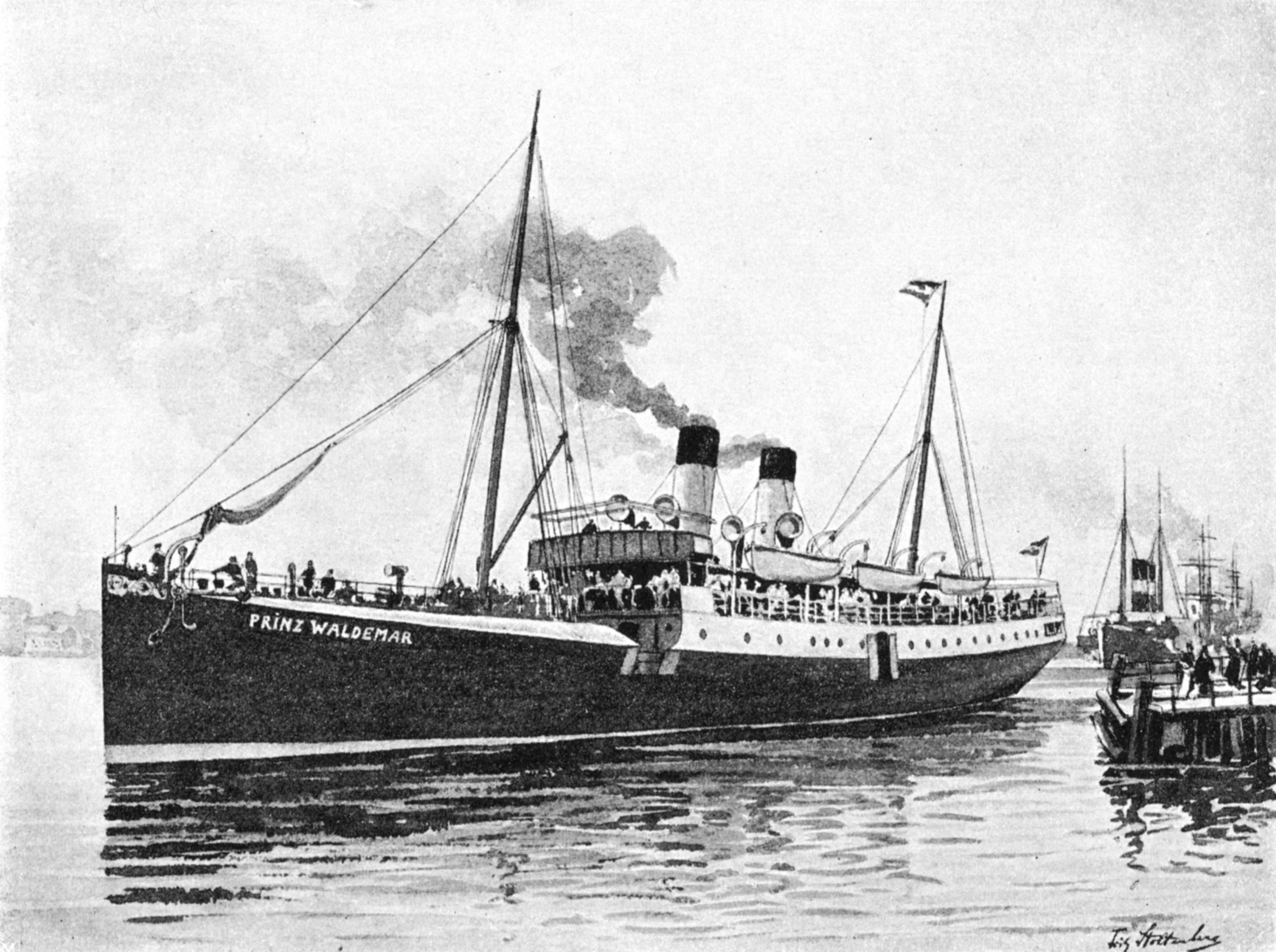 Der ehemalige Postdampfer Prinz Waldemar in Kiel, Zeichnung von Fritz Stoltenberg um 1895